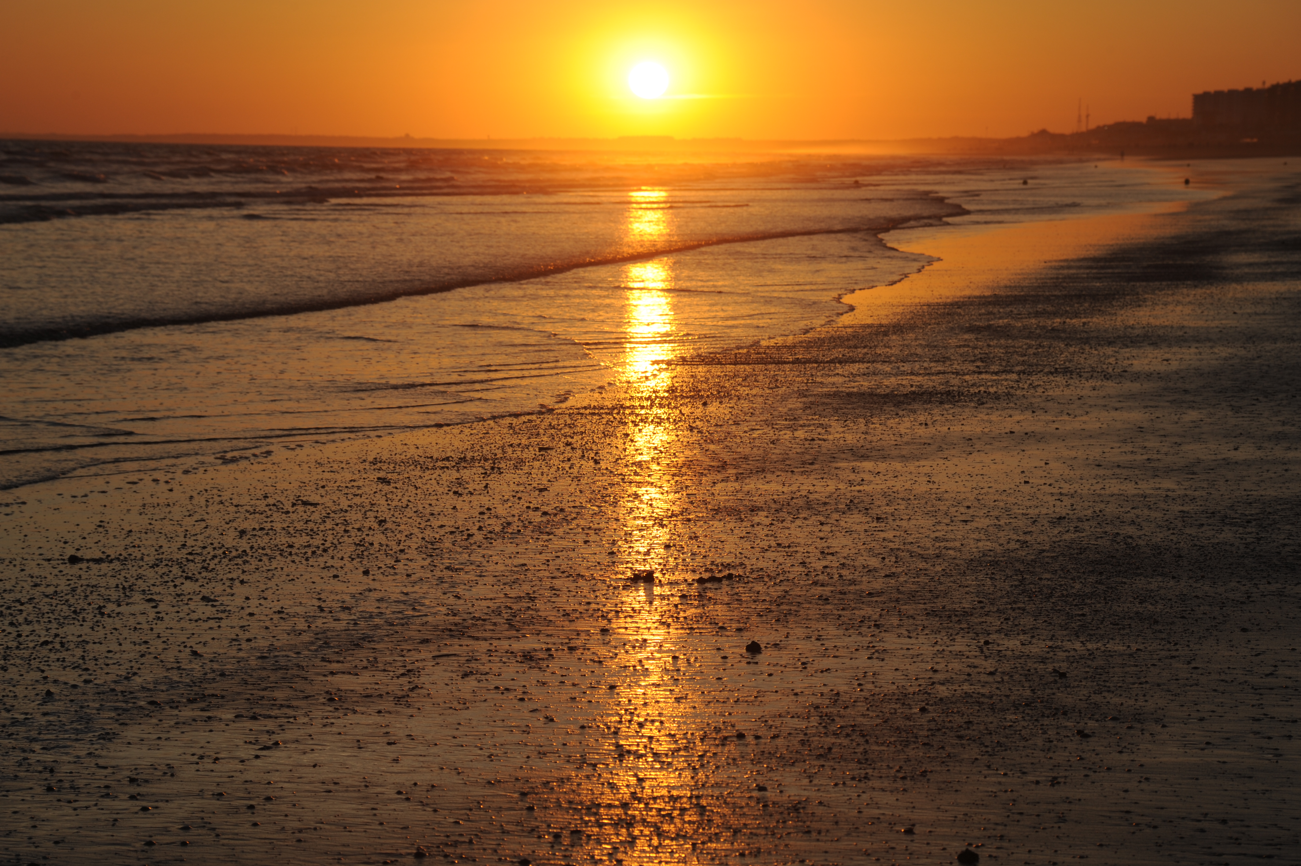 Puesta de Sol en las playas vírgenes Punta Umbría (Huelva)